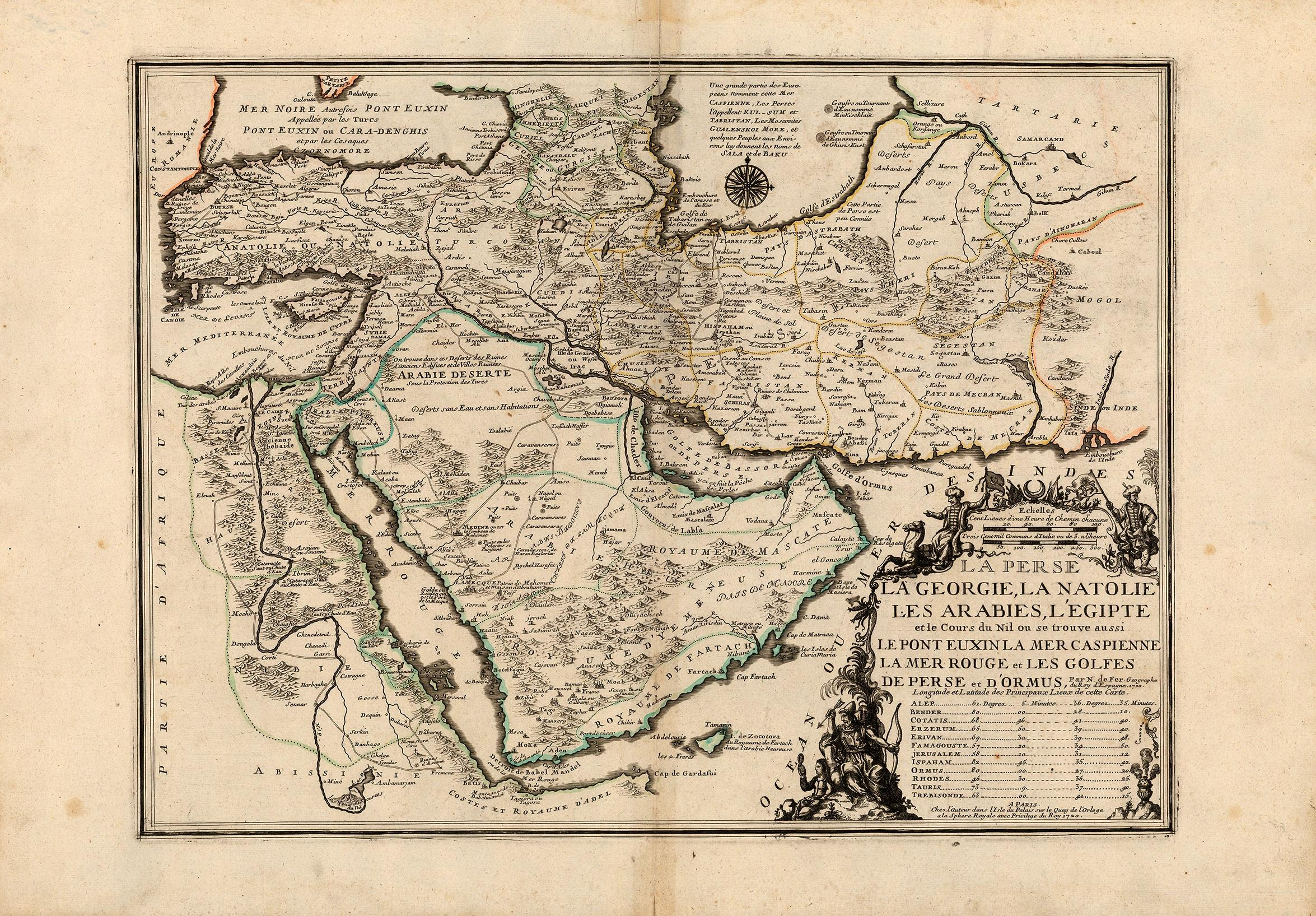 Nicolas de Fer, La Perse La Georgie, La Natolie, Les Arabies, L'Egipte, Paris, 1720, 59 x 44 cm